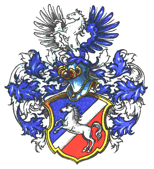 Wappen der von Mutius